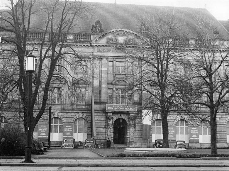 Berlin, Akademie der Künste Zentralbild Reinsch Bn.-Ho. 5 Motive 19.11.1955 Ausstellung Jean Antoine HOUDON in der Deutschen Akademie der Künste in Berlin In der Deutschen Akademie der Künste, Berlin, werden vom 11. November 1955 bis 11. Dezember 1955 Werke des französischen Bildhauers Jean Antoine HOUDON ausgestellt. J.A. HOUDON war einer der bedeutendsten französischen Plastiker des 18. Jahrhunderts. UBz: Blick auf die Deutsche Akademie der Künste, in der die Ausstellung J. A. HOUDON untergebracht ist.